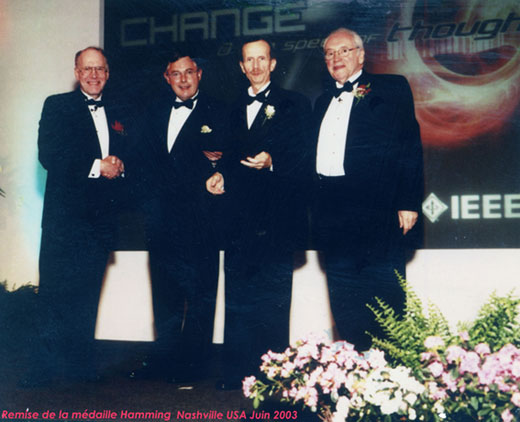 Alain Glavieux. Remise de la médaille Hamming à Nashville USA